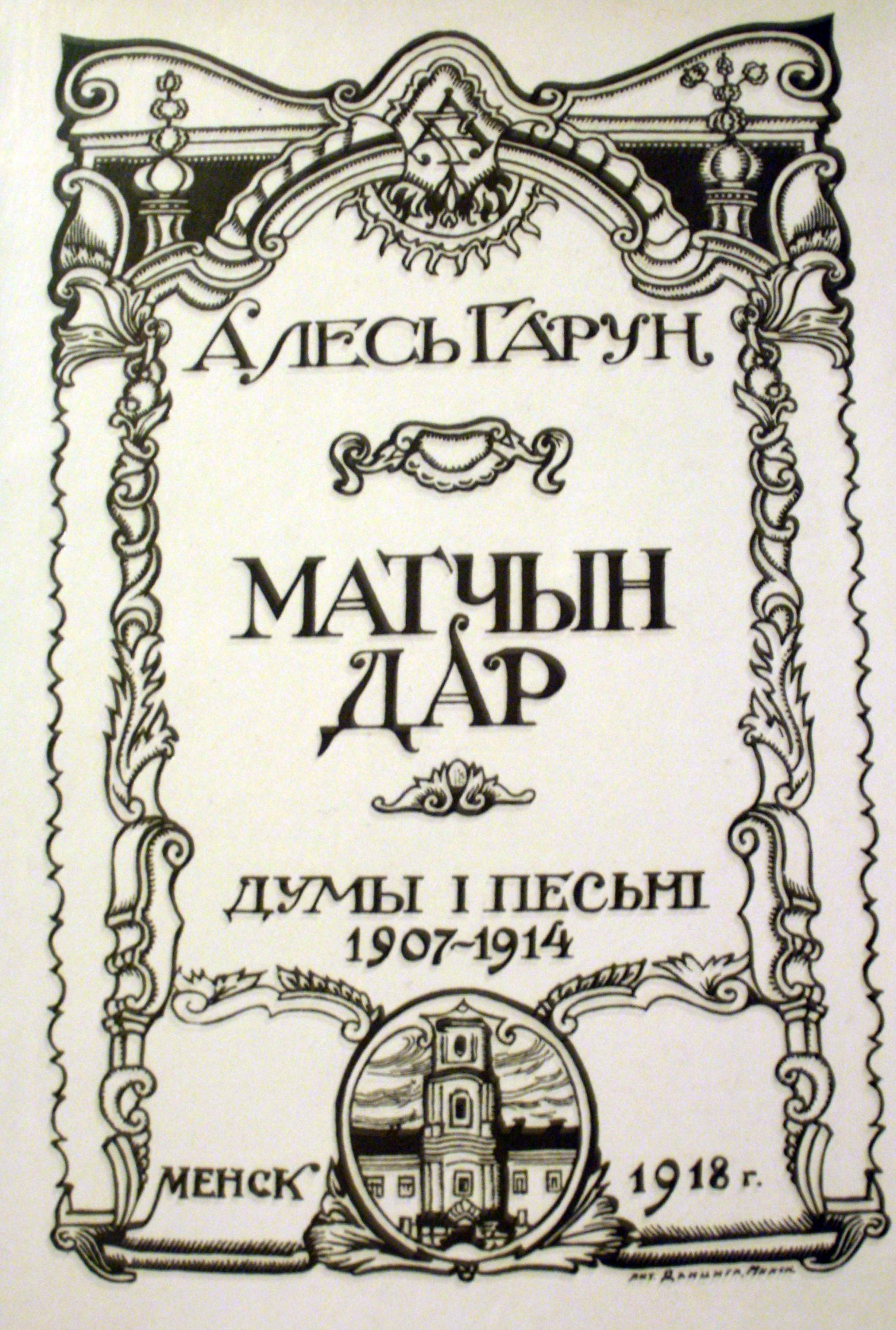 Беларуская (тарашкевіца): Алесь Гарун-Матчын Дар, выданне 1918 году, Менск. Факсімільнае перавыданьне 1988 году.